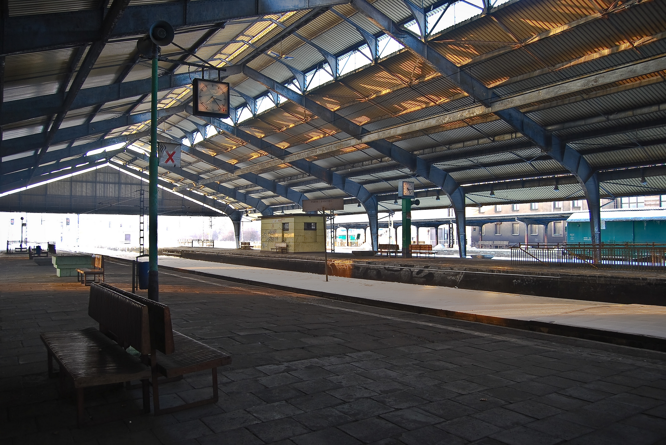 Hala peronowa w Bytomiu